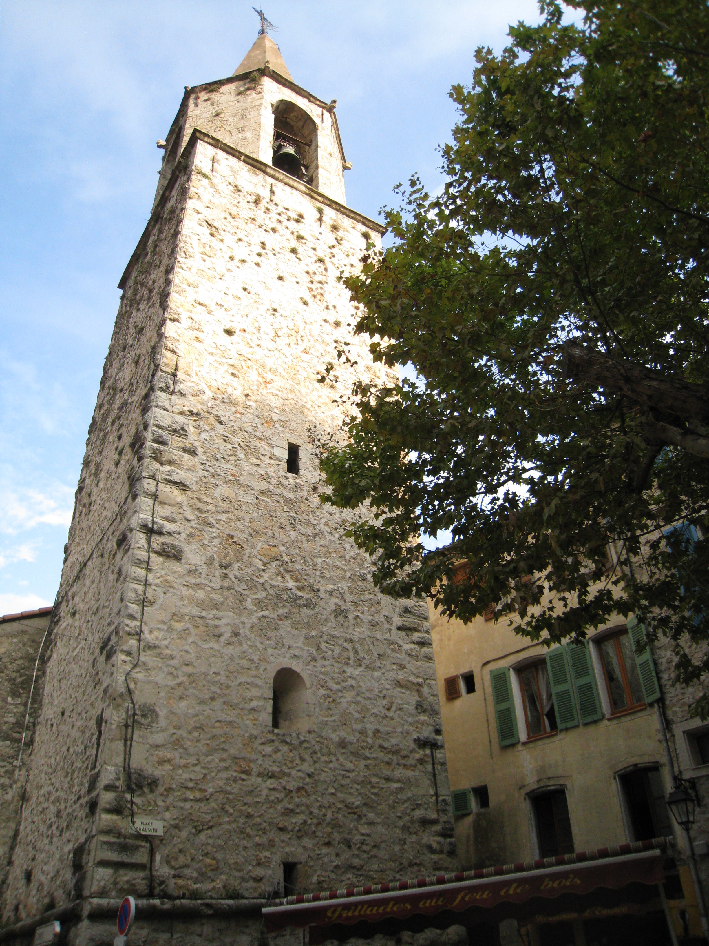 Église Notre-Dame de Favas (Inscrit) .